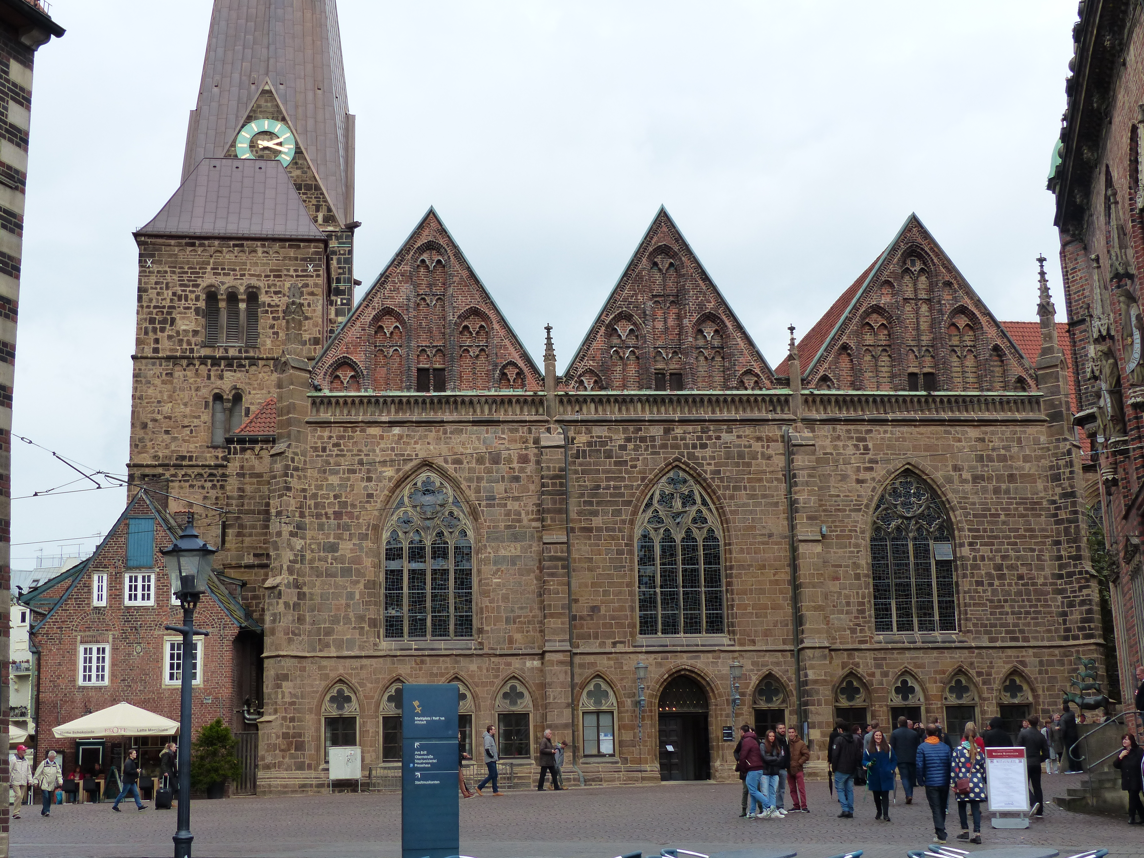 Kirche Unser Lieben Frauen in Bremen, vom Markt gesehen